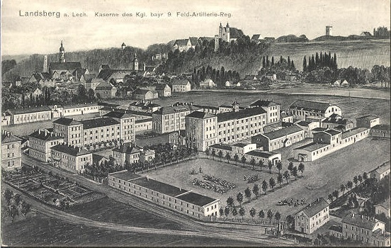 Artillerie-Kaserne in Landsberg am Lech, später Saarburgkaserne, vor 1913 gelaufene Postkarte